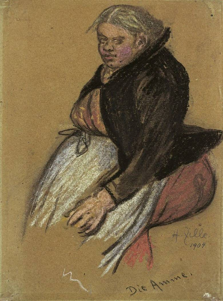 Heinrich Zille: Die Amme 1904. Farbkreide auf dünnem Papier. 25,4 x 18,5 cm